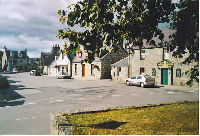 Tarland, Aberdeenshire